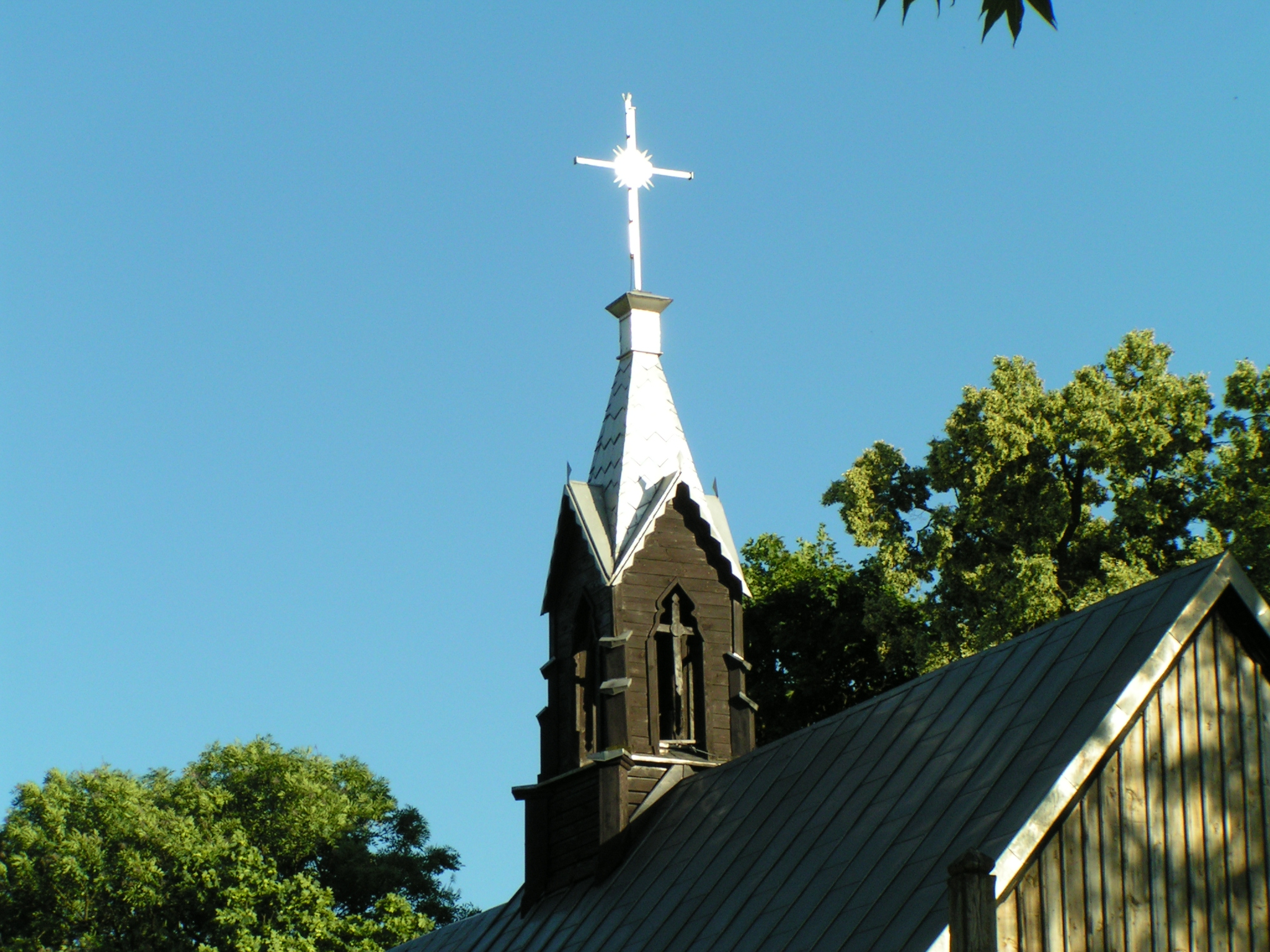 Kościół parafialny w Malużynie - neogotycka wieżyczka